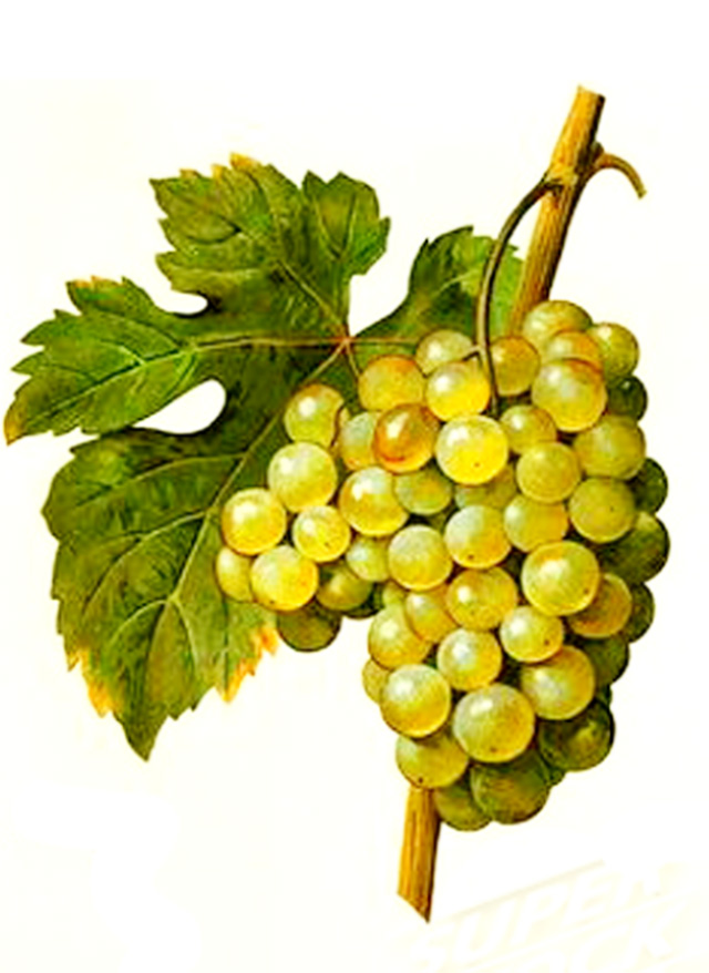 Grappe de Muscat de Saumur par Viala et Vermorel